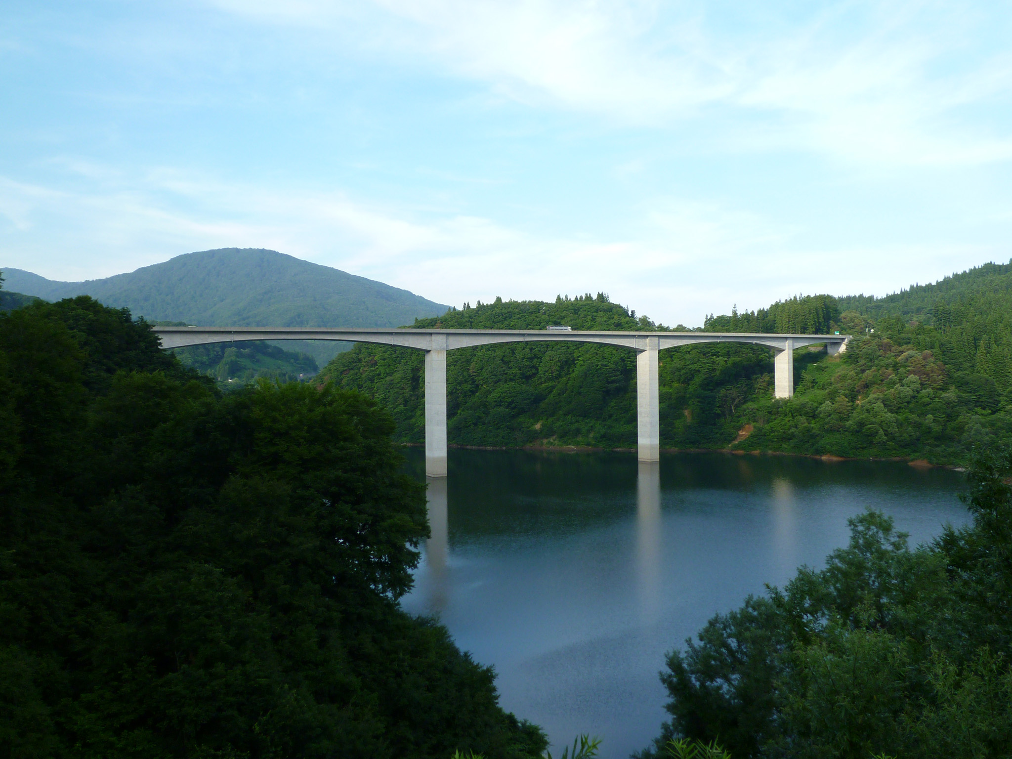 寒河江ダムの月山湖を跨ぐ山形自動車道（山形県西村山郡西川町大井沢付近より撮影）